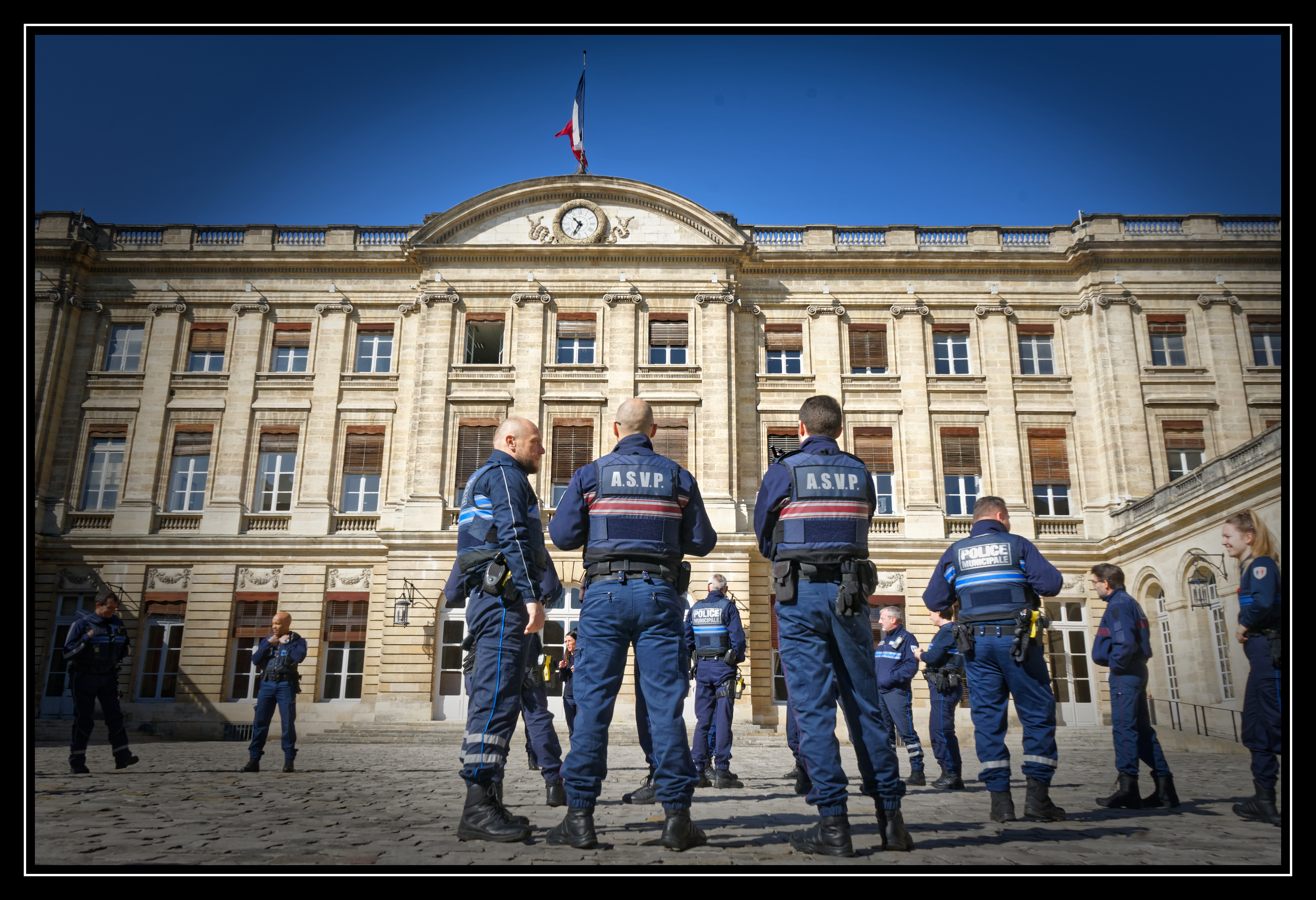 Equipe devant l'Hôtel de Ville de Bordeaux.